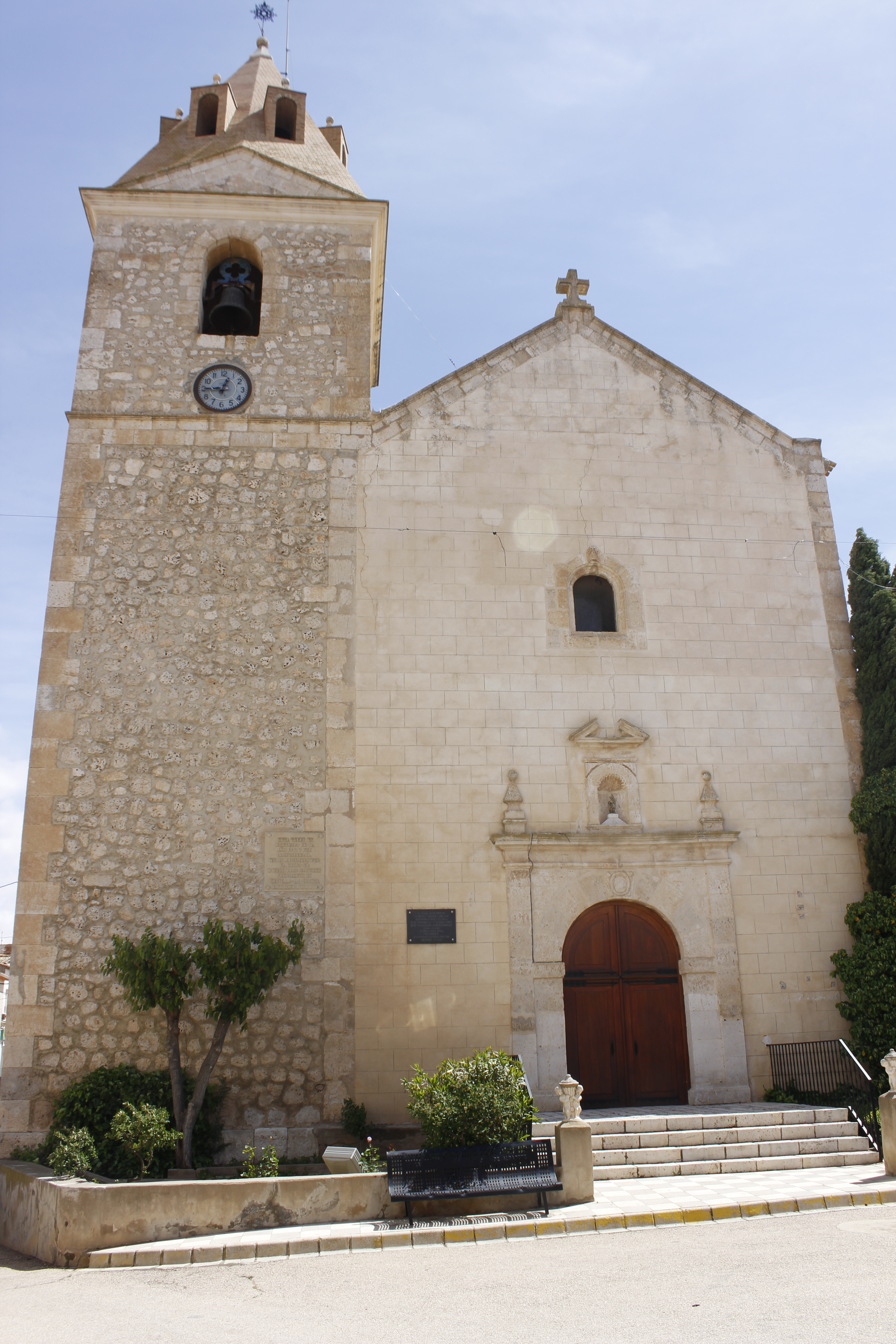 Pendiente